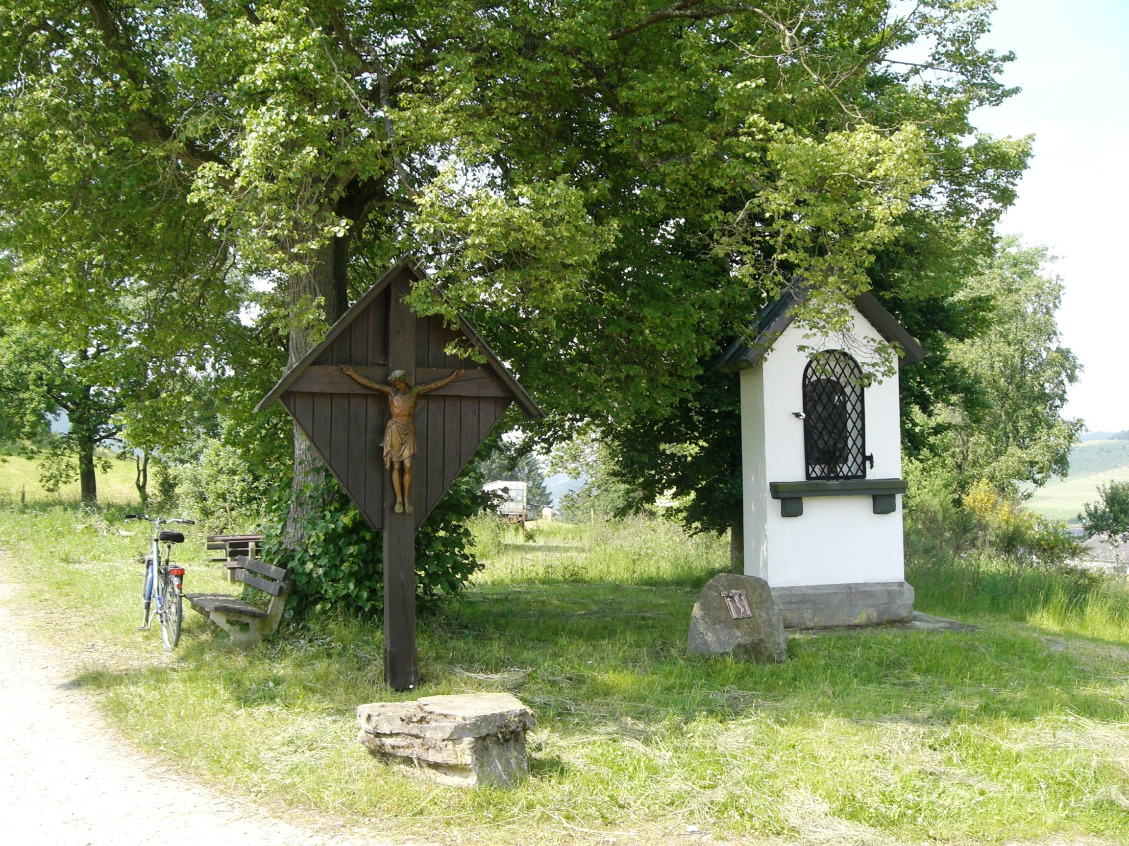 Blick auf die Lausebuche im Grenzbereich der Ortschaften Oberelspe und Elspe